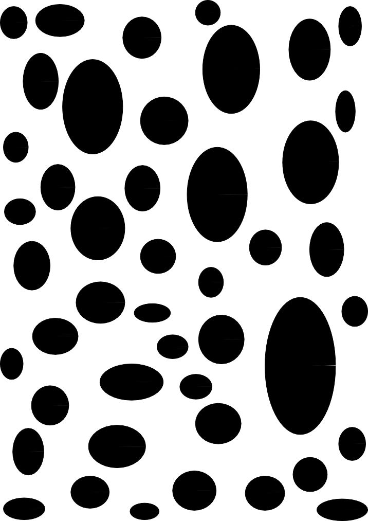 Material poroso com poros na cor preta.